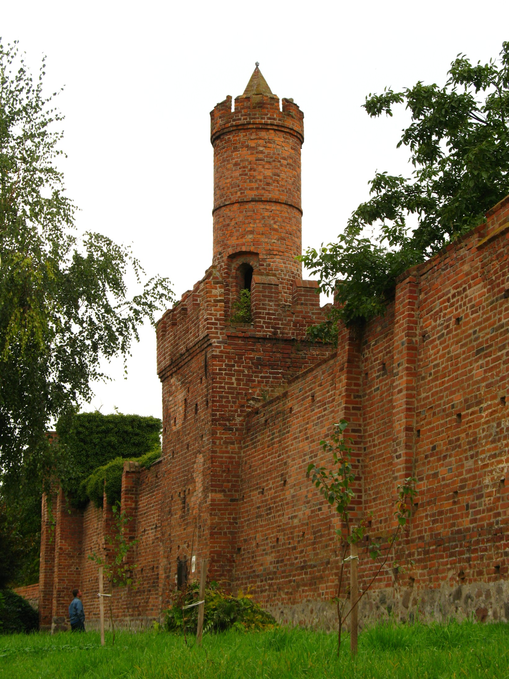 Pyrzyce - fragment murów obronnych